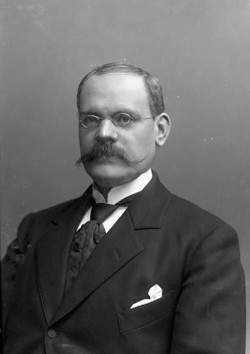 Francis Hagerup (1853–1921), professor og statsminister (H).